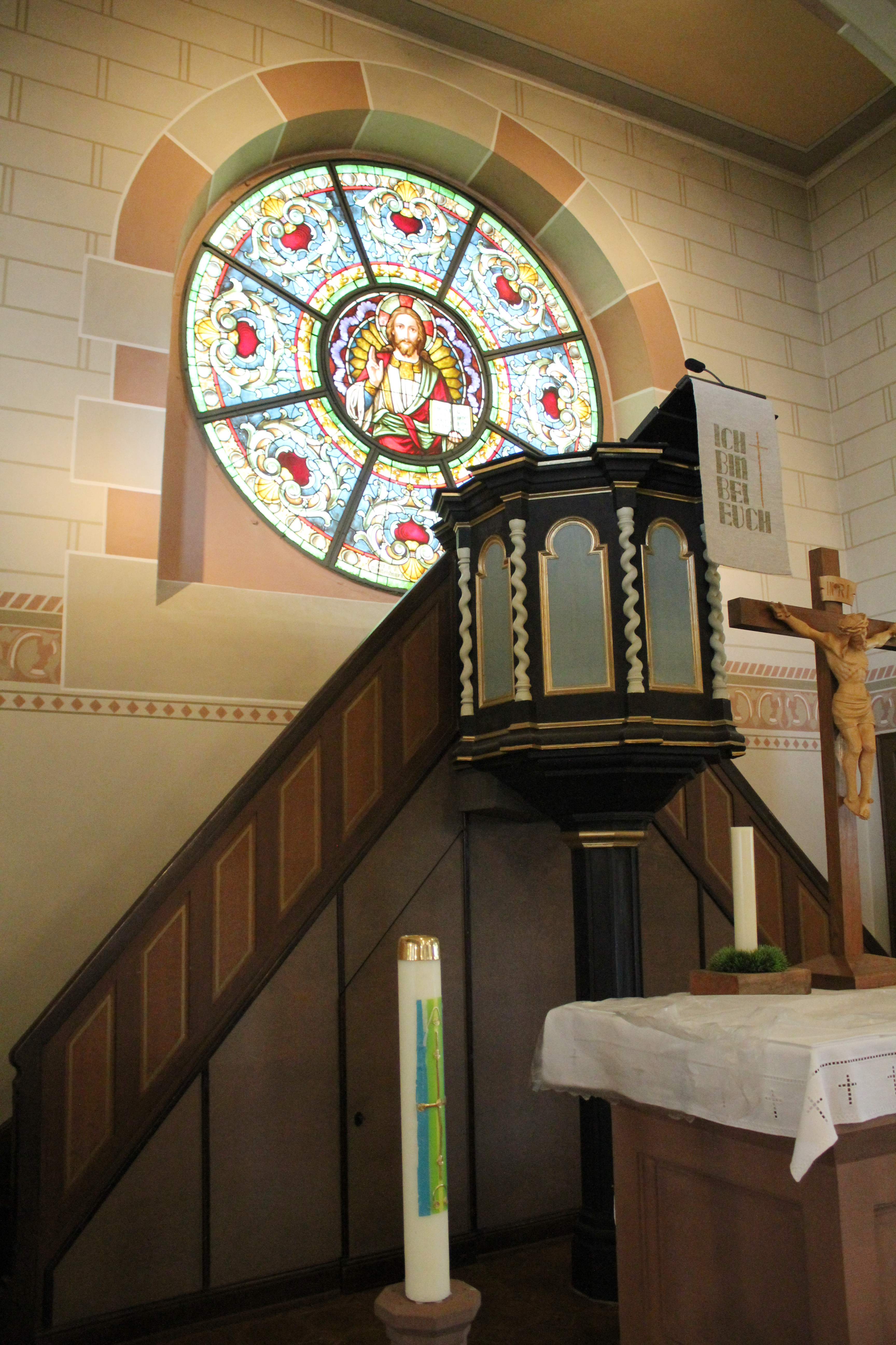 Evangelische Kirche Wetzlar-Dutenhofen, Lahn-Dill-Kreis, Hessen, Deutschland